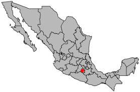 Locator map of Cuernavaca, Morelos, Mexico